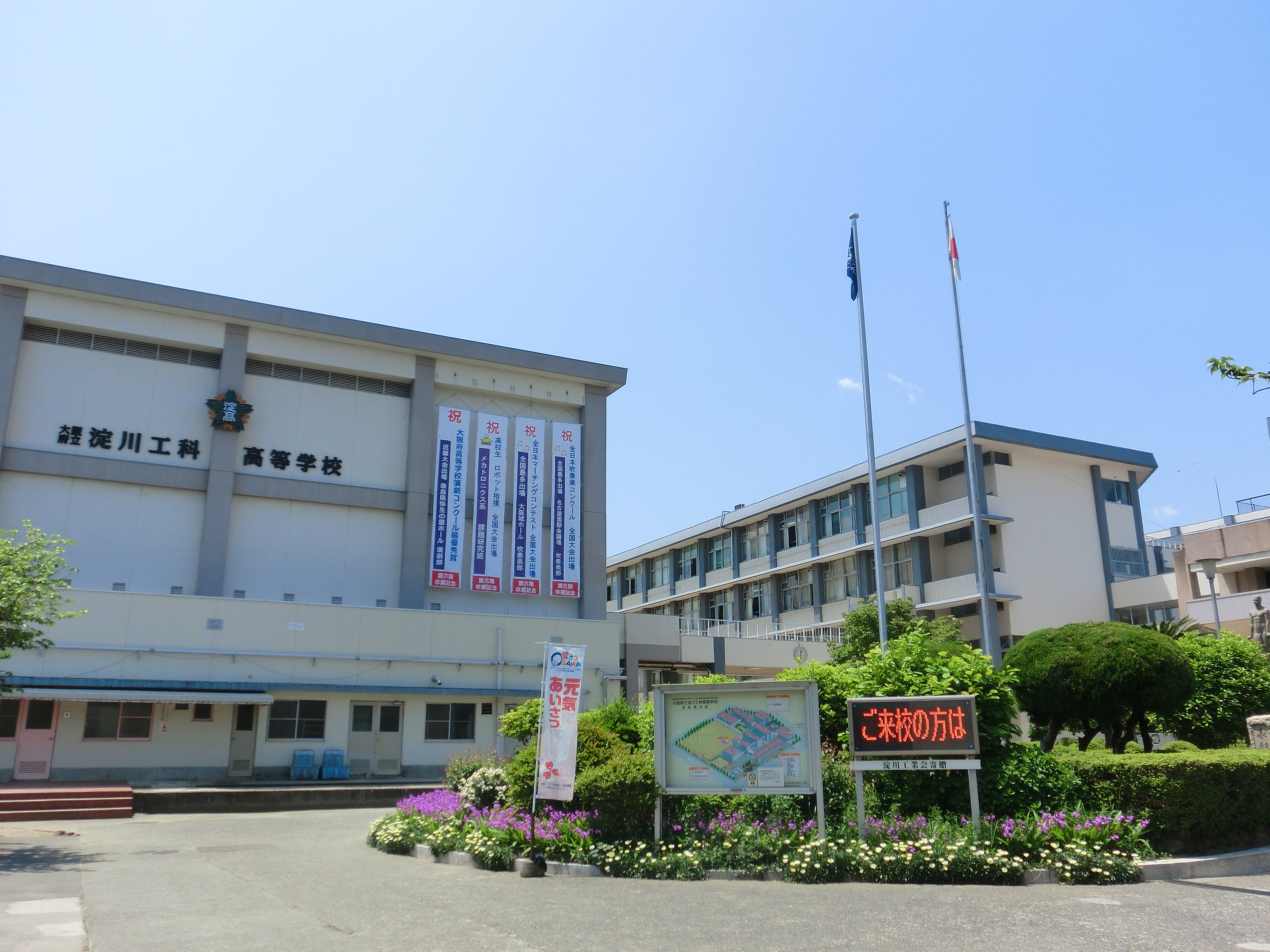 淀川工科高等学校校門より